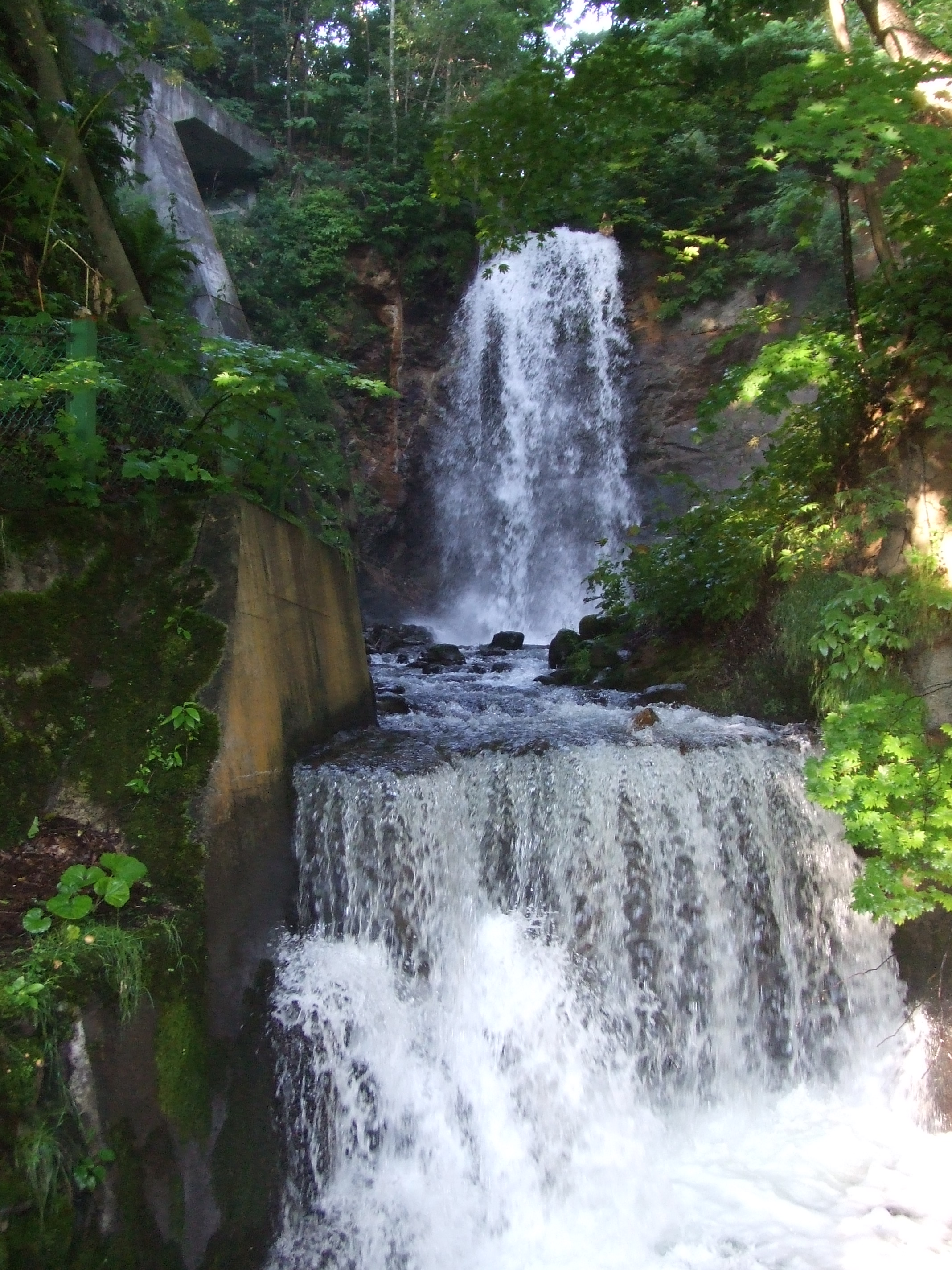 北海道札幌市 白糸の滝（2014年8月14日）